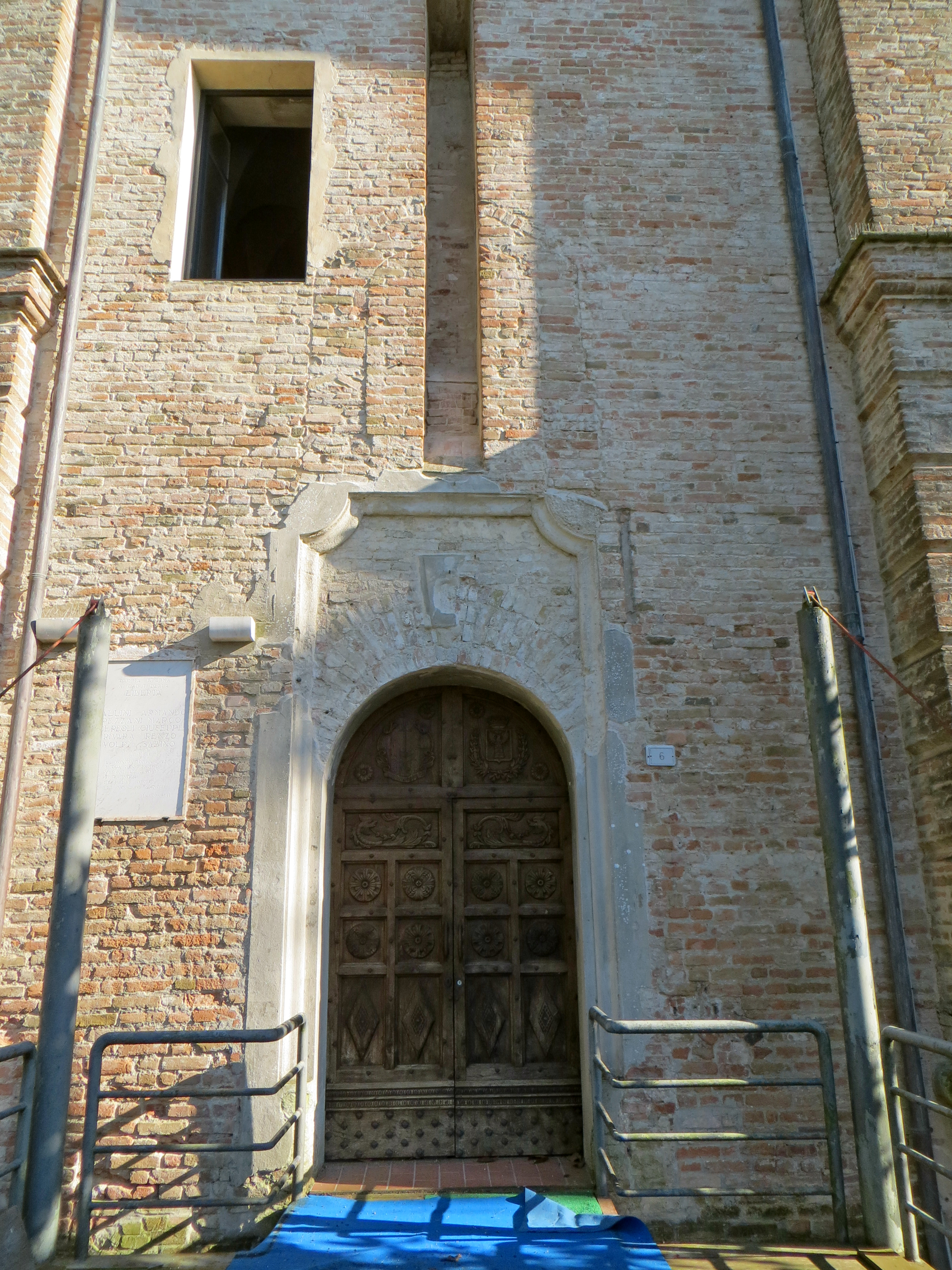 Rocca dei Terzi (Sissa) - portale d'ingresso